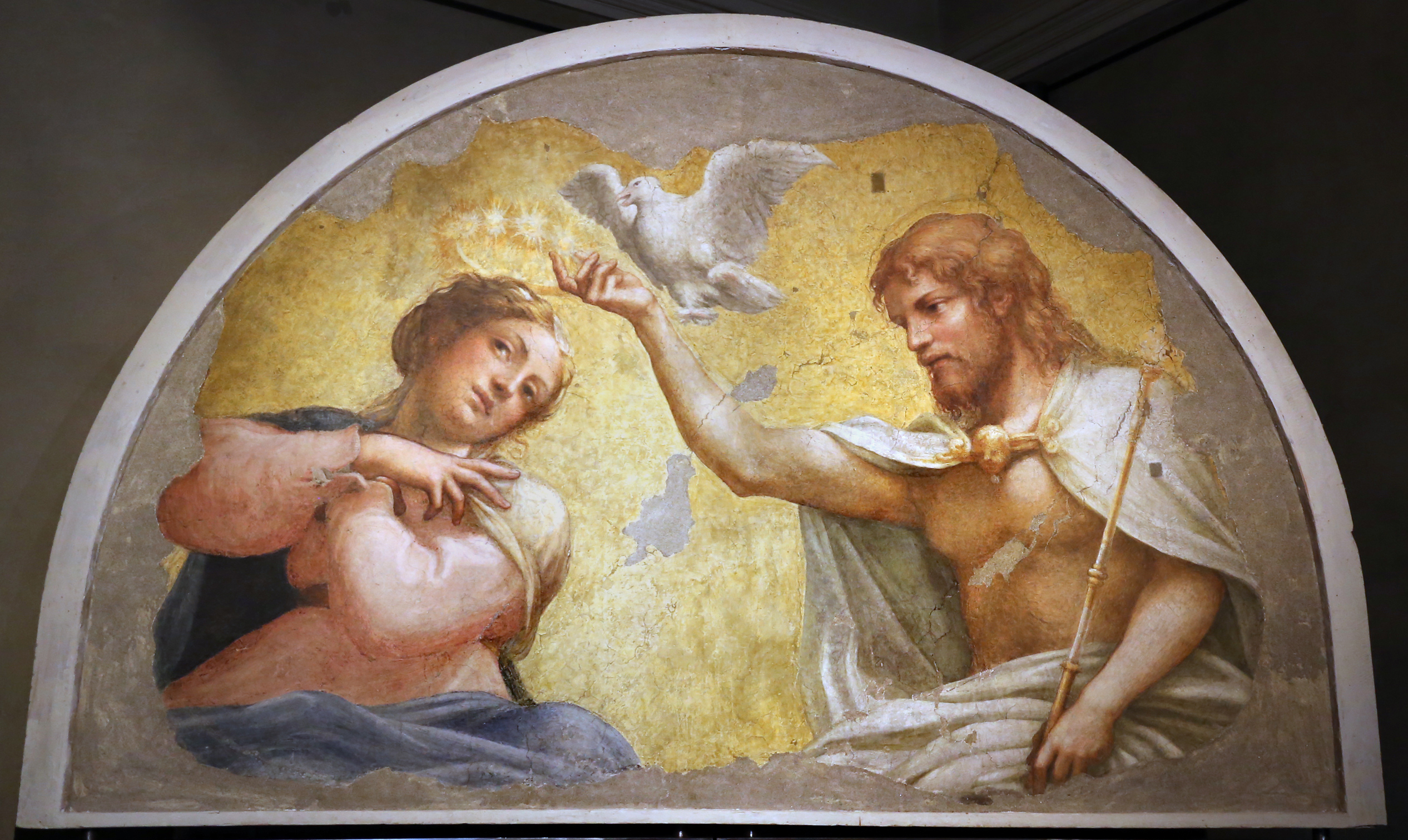 Paintings in the Galleria nazionale (Parma) This is a photo of a monument which is part of cultural heritage of Italy.